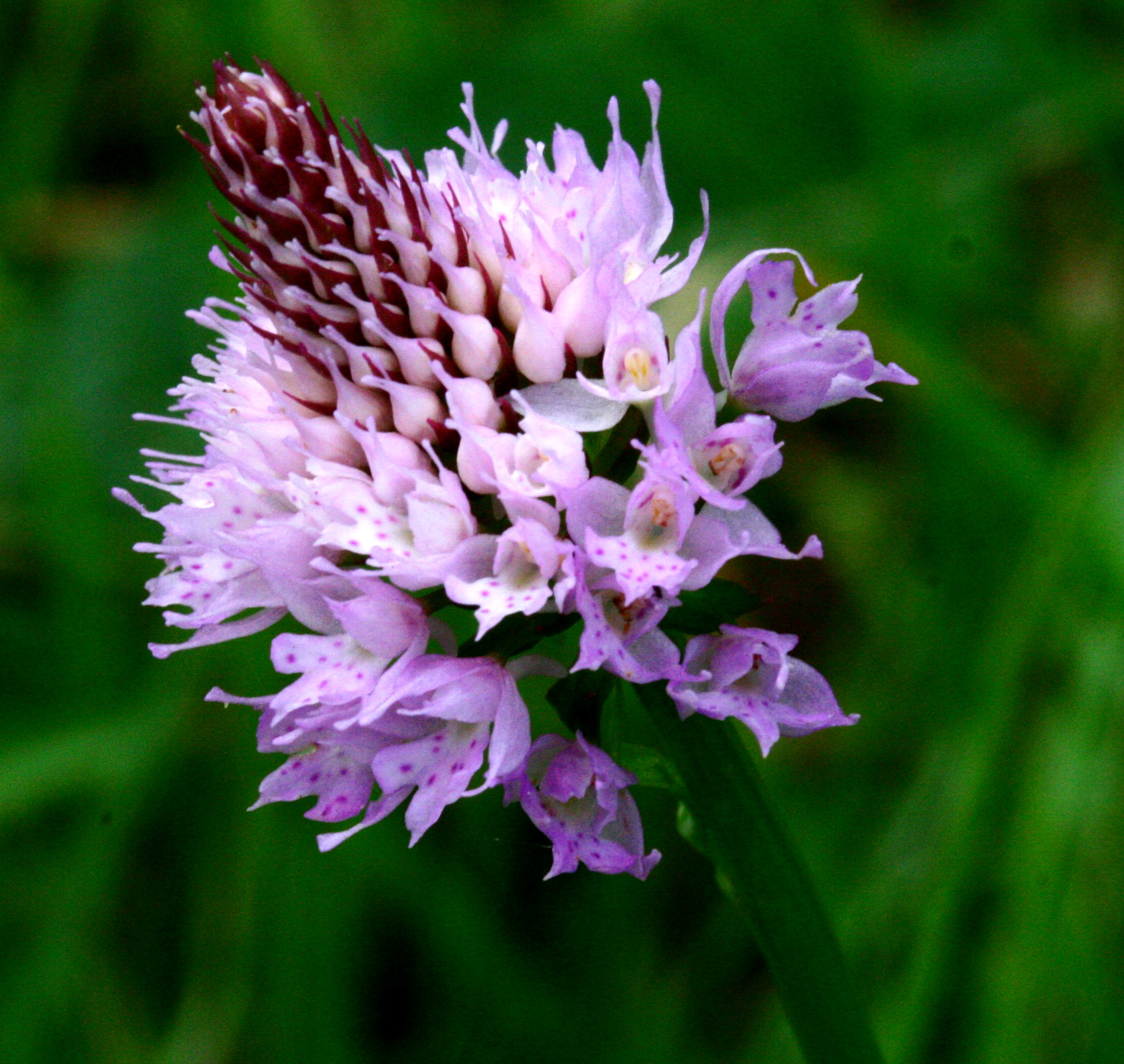 Orchide dei pascoli - Località: "Giardino Botanico delle Alpi Orientali", Monte Faverghera (BL), 1500 m s.l.m.